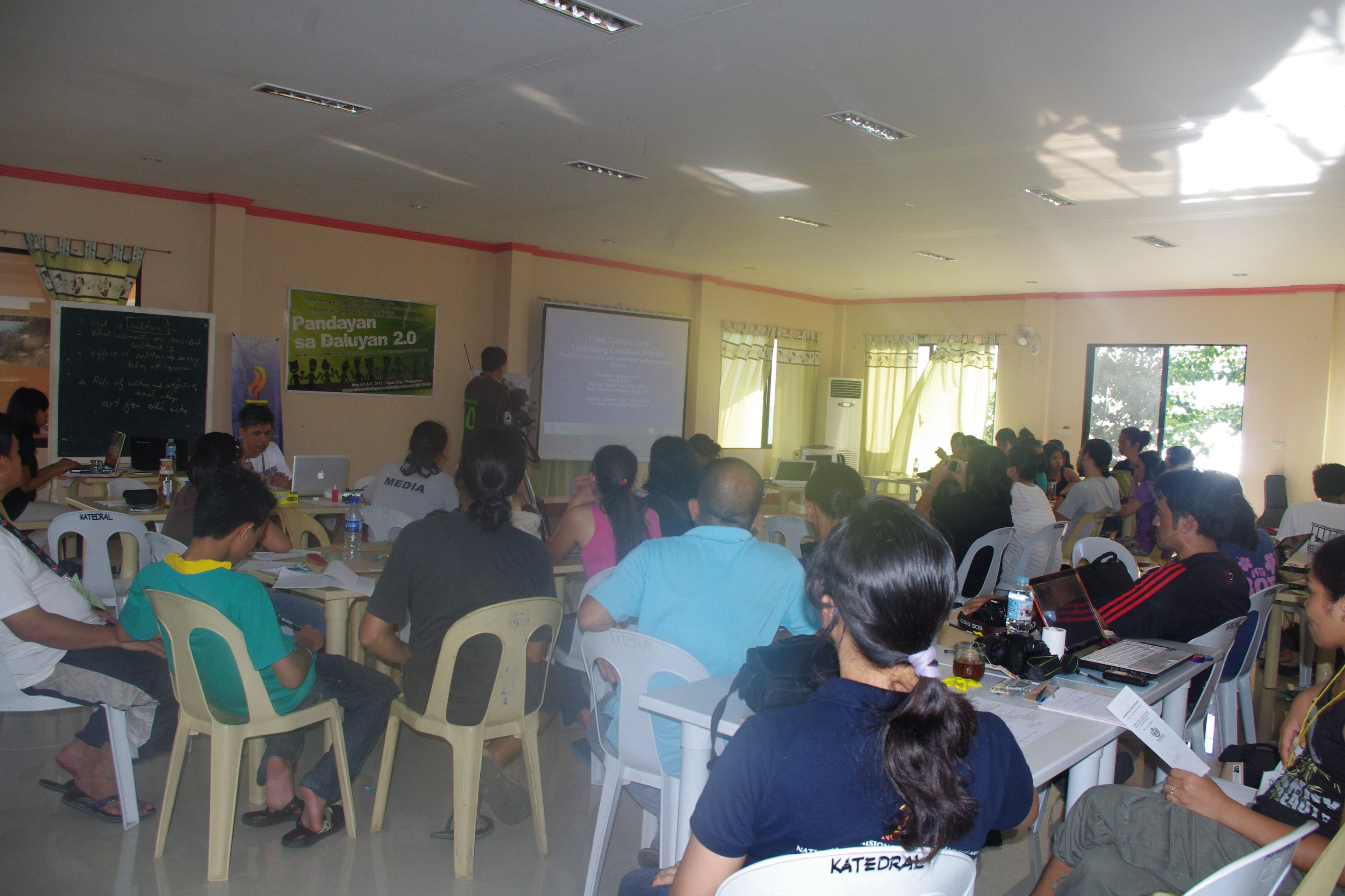 Open Web Day events